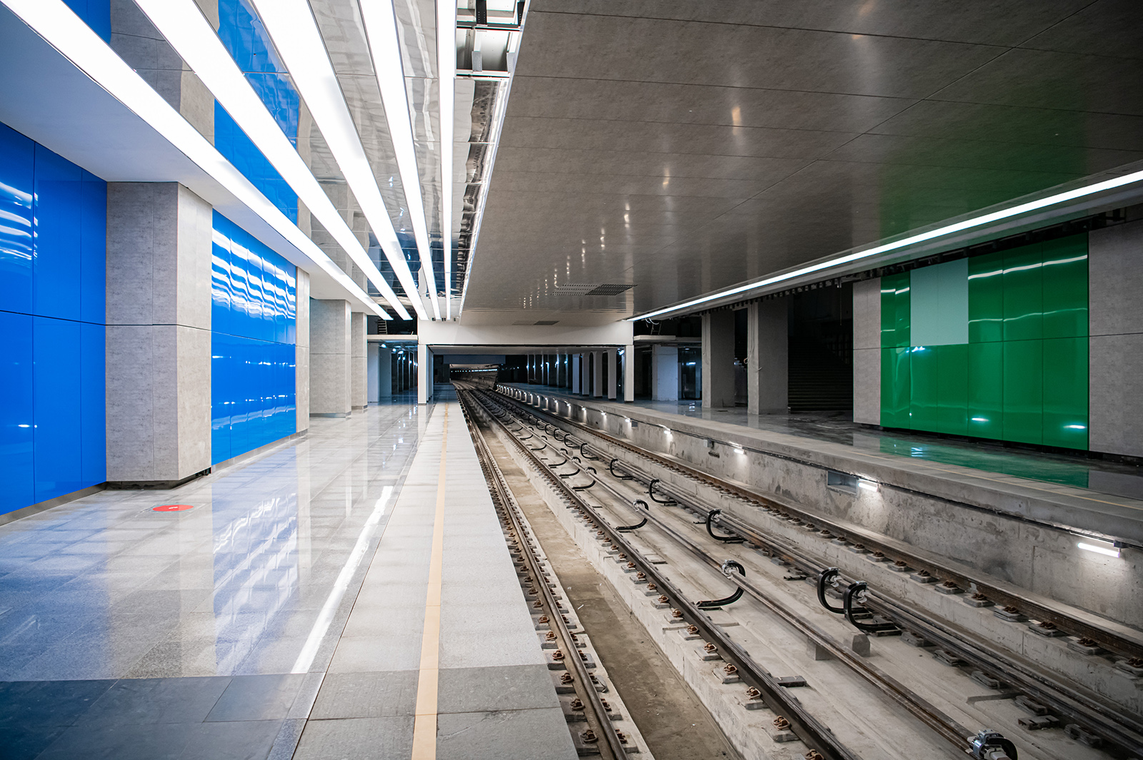 Станция метро Нижегородская в январе 2020 года